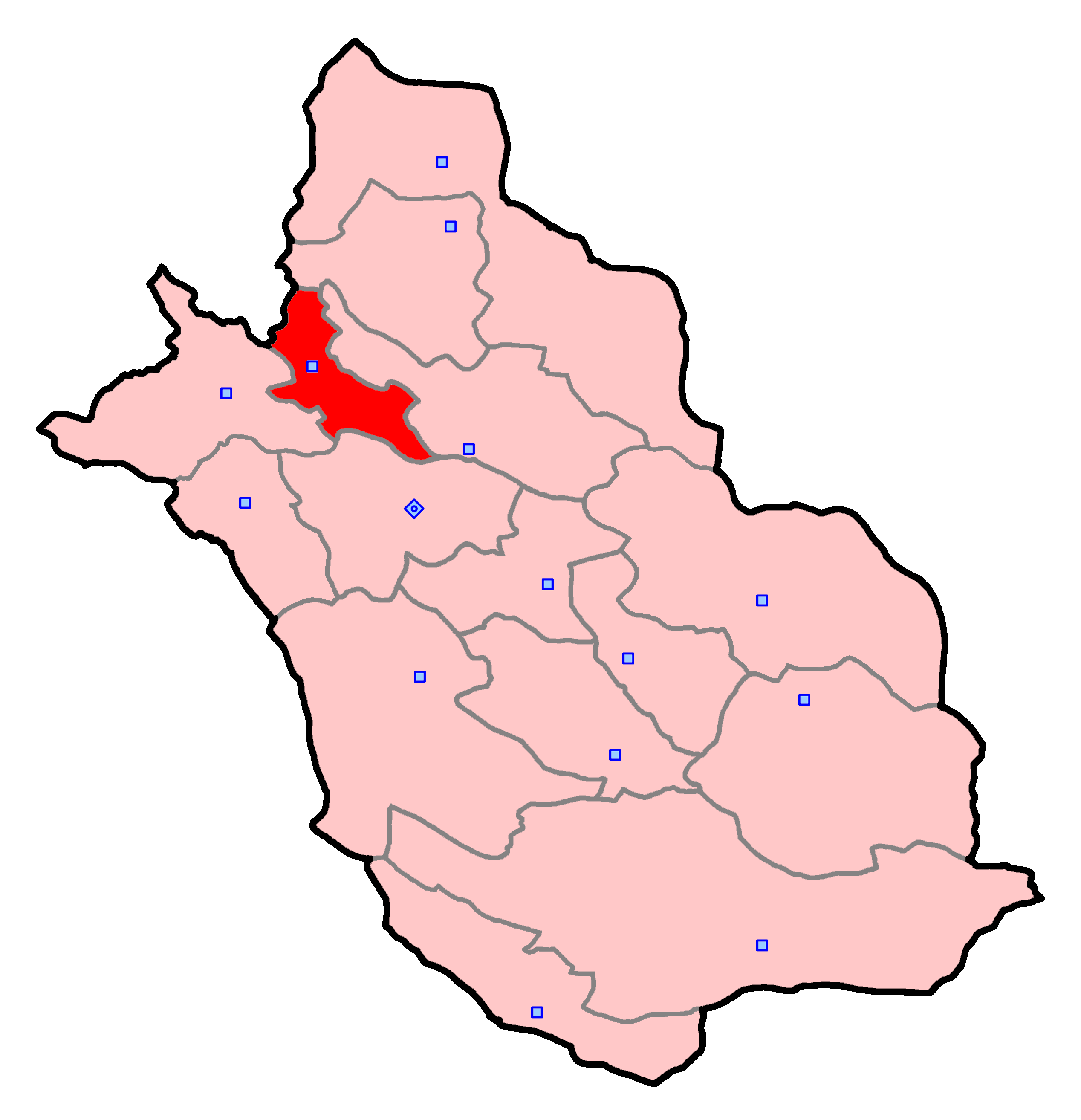 حوزهٔ انتخاباتی اردکان برای انتخابات مجلس شورای اسلامی